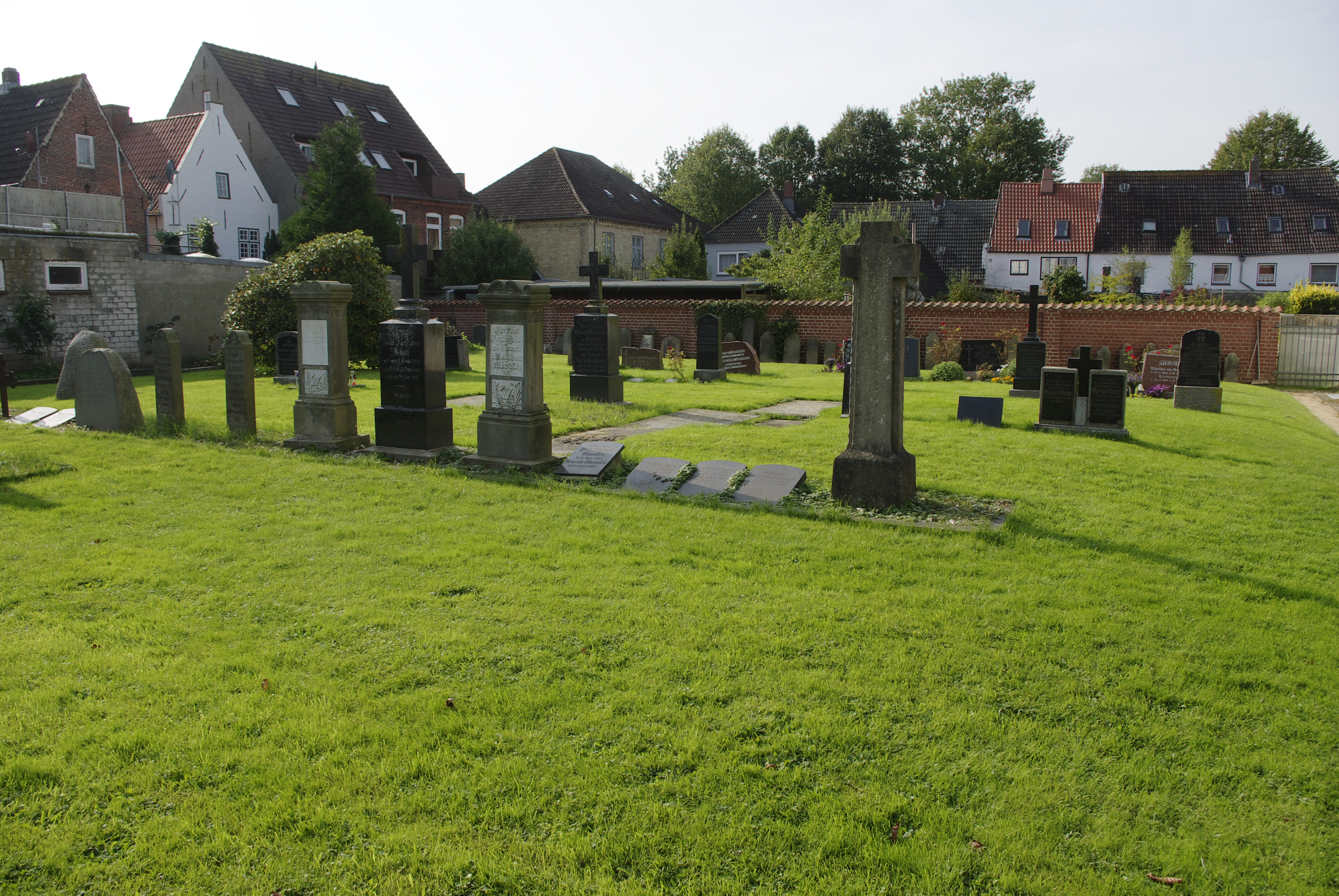 Kulturdenkmale in Friedrichstadt Nummer 25